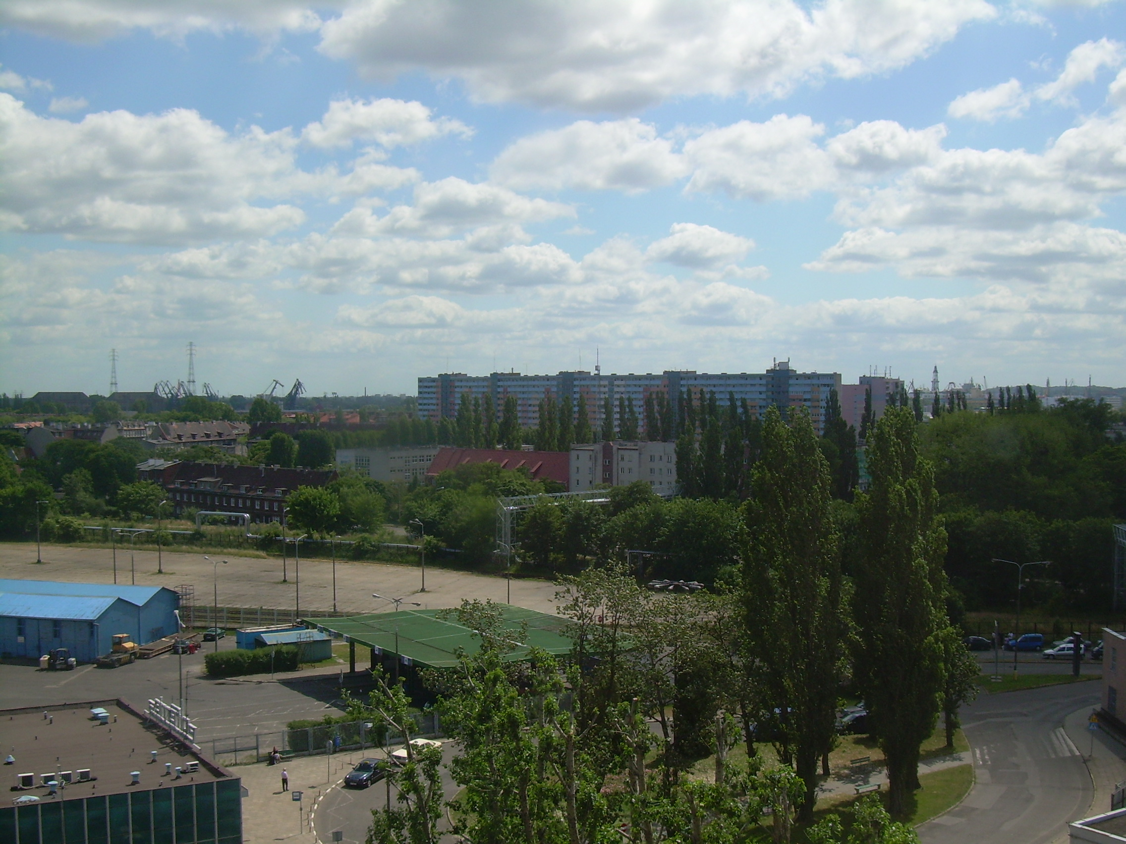 Widok na Nowy Port z latarni morskiej przy Nabrzeżu Ziółkowskiego.